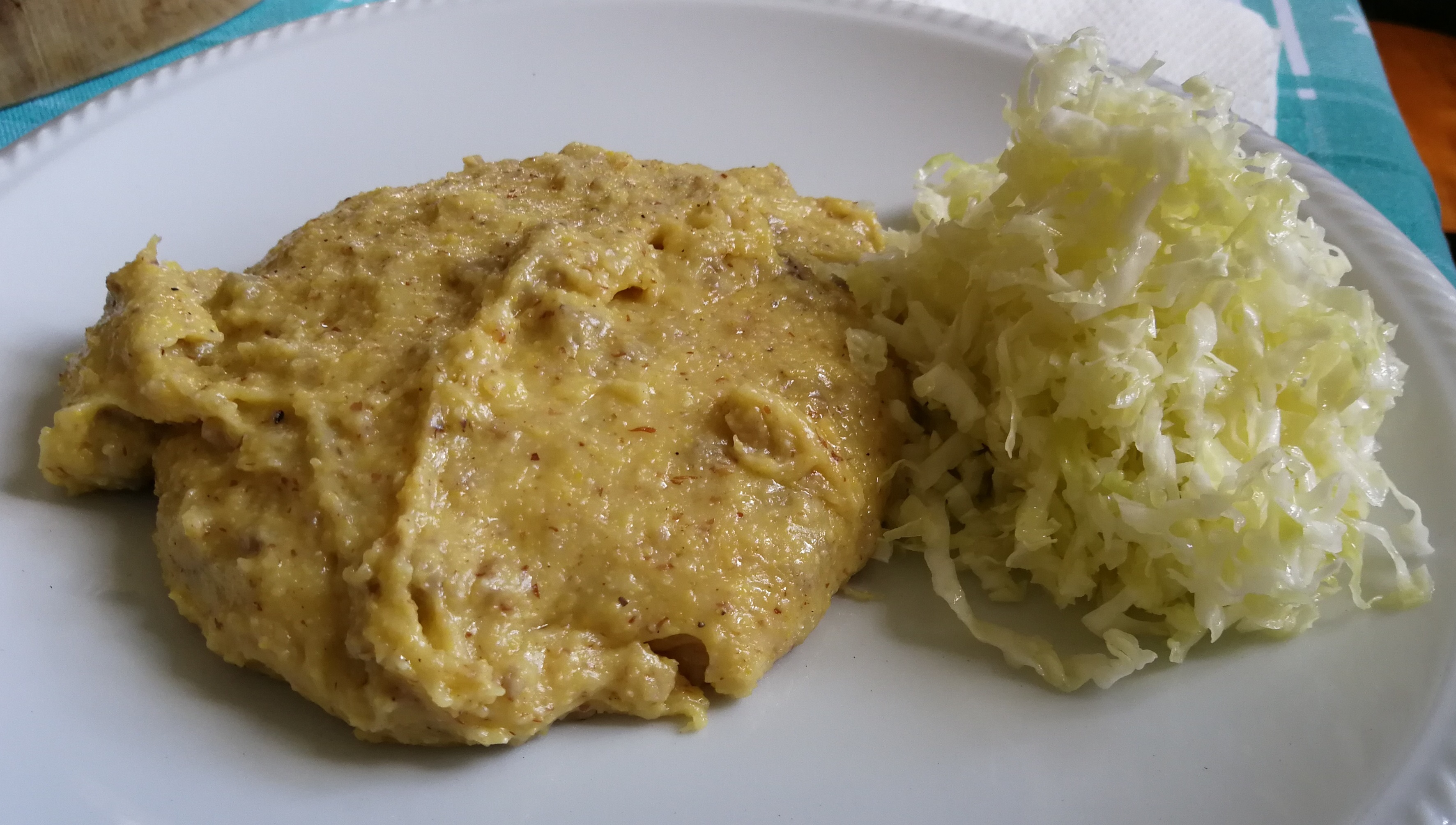 Polenta carbonera e verze - piatto tipico di Storo